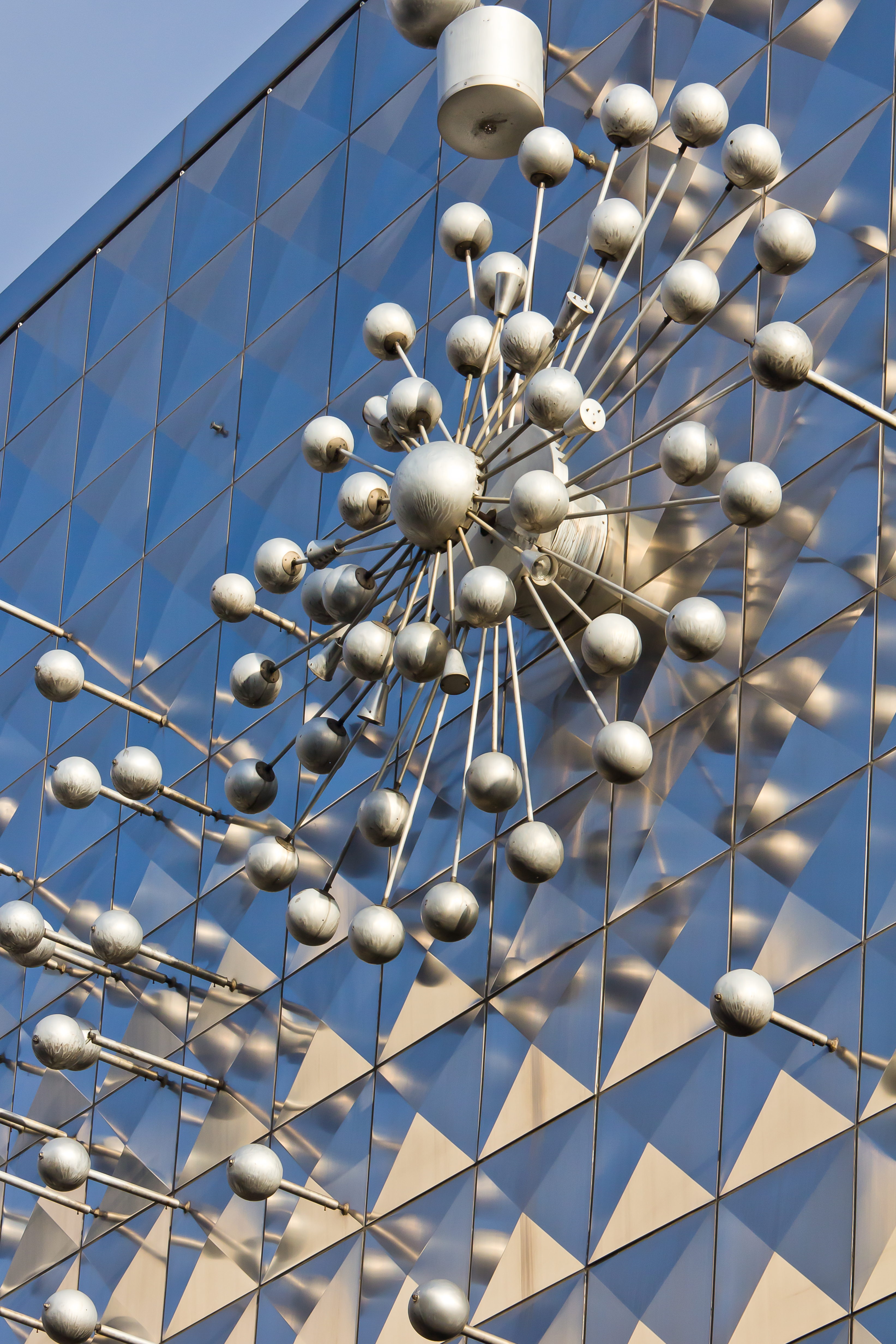 Geschäftshaus Hohe Straße in Köln mit der elektronisch programmierten kinetischen Lichtplastik „Licht und Bewegung“ von Otto Piene, 1966